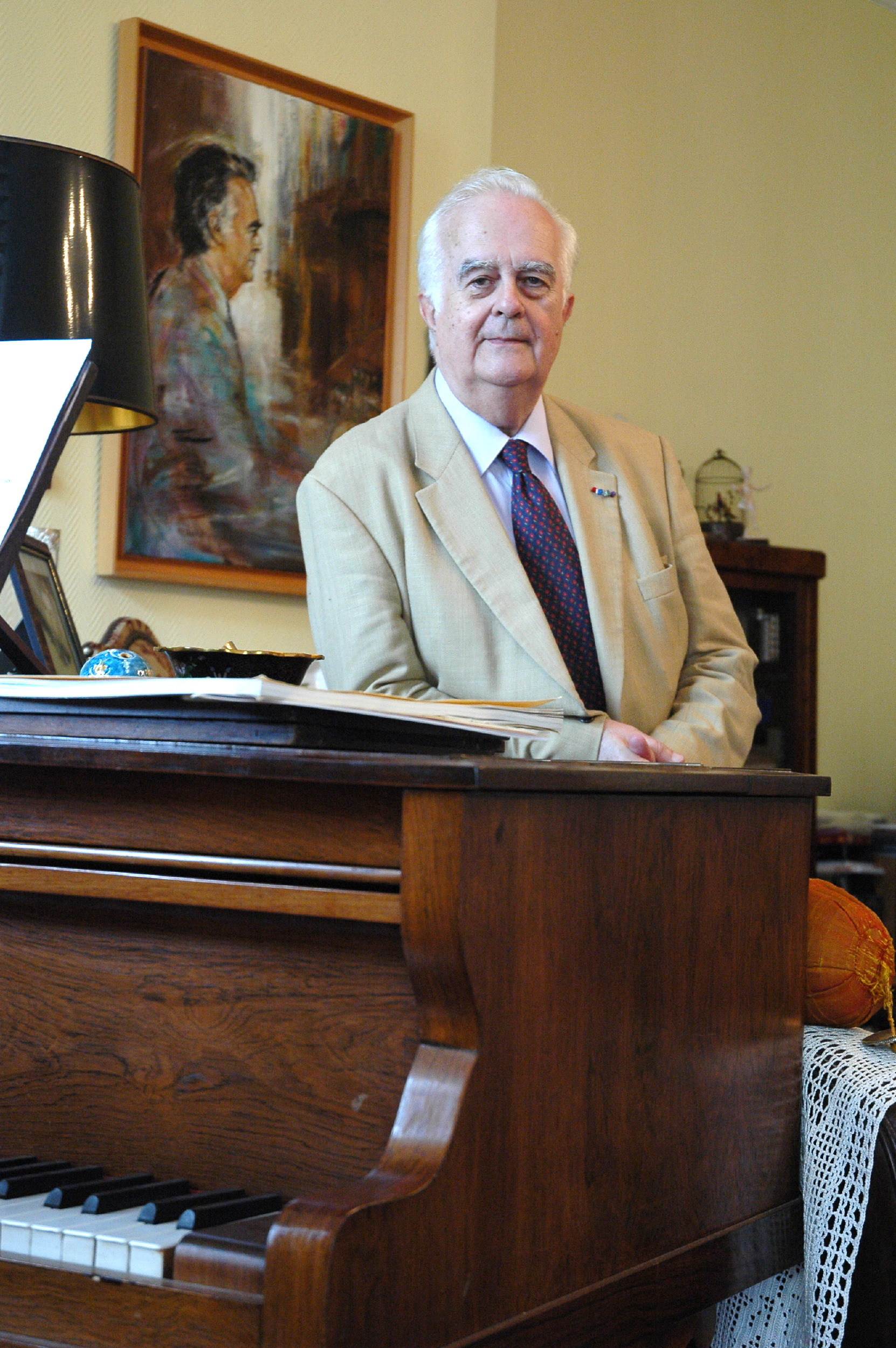 Portrait de Jacques Charpentier.